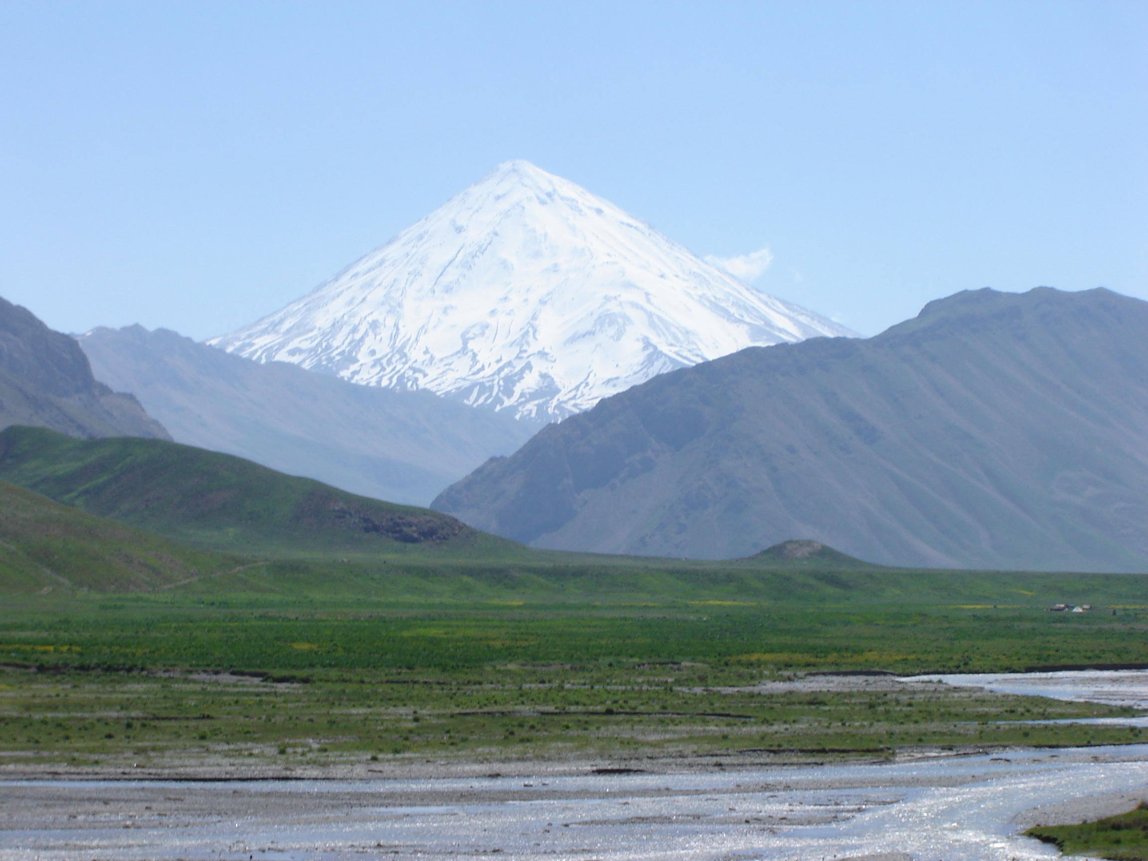 Almighty Damavand دماوند پوشیده ازبرف ازدوراهی معدن کمردشت